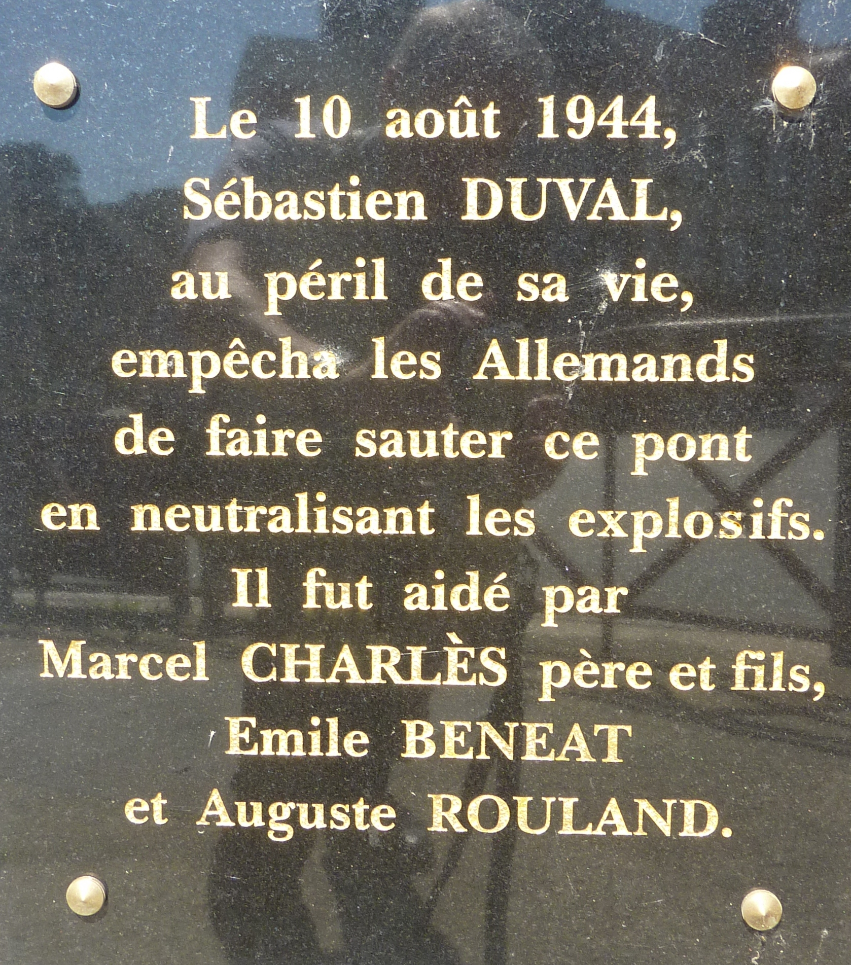 Châteaulin : plaque commémorative Sébastien Duval (10 août 1944) placée sur le pont de Châteaulin